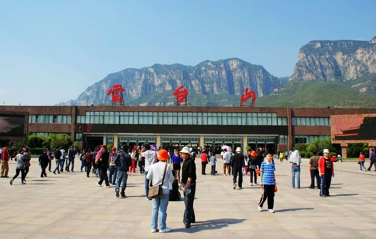 Yuntai mountain